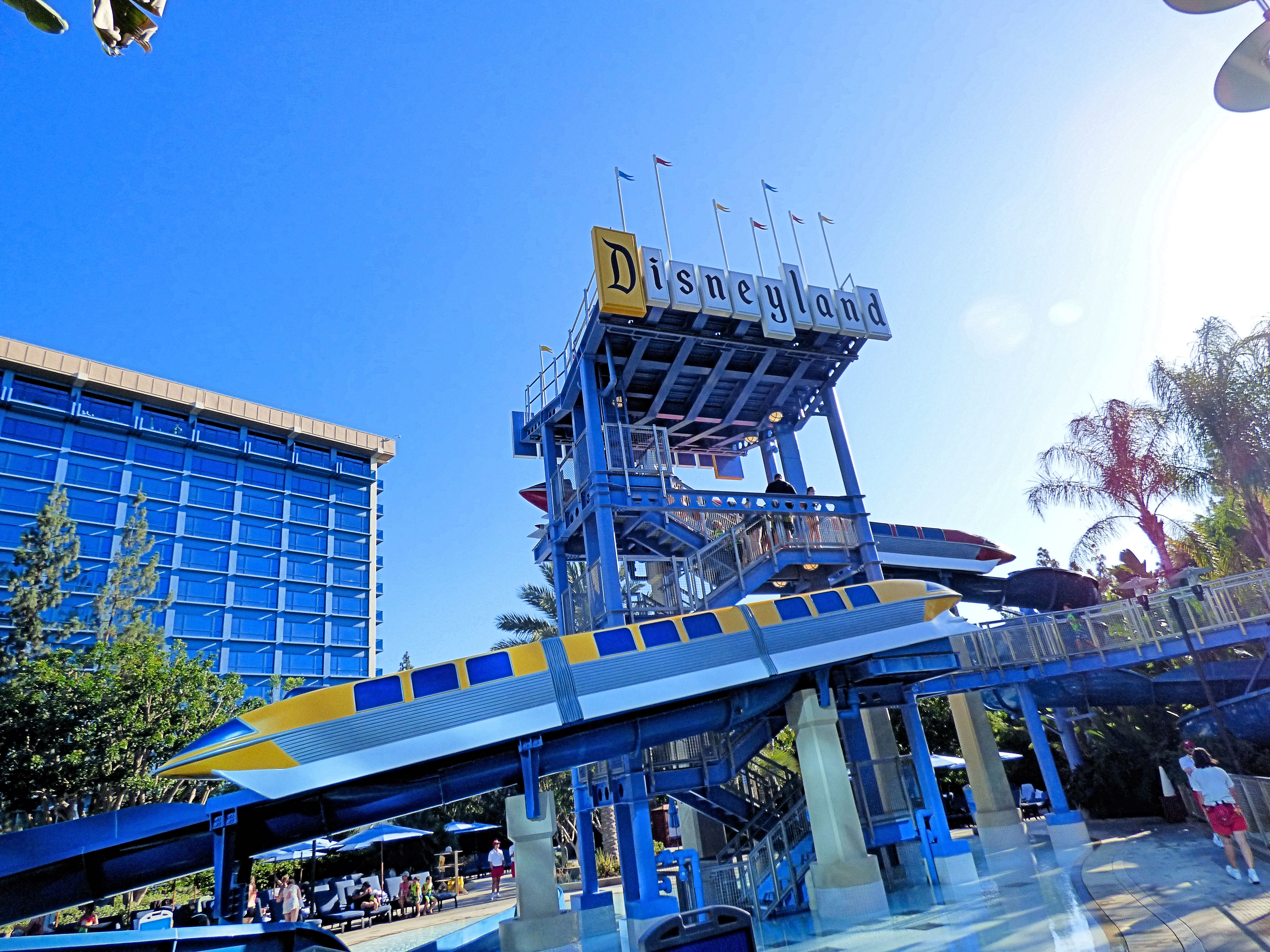 DisneylandHotel5